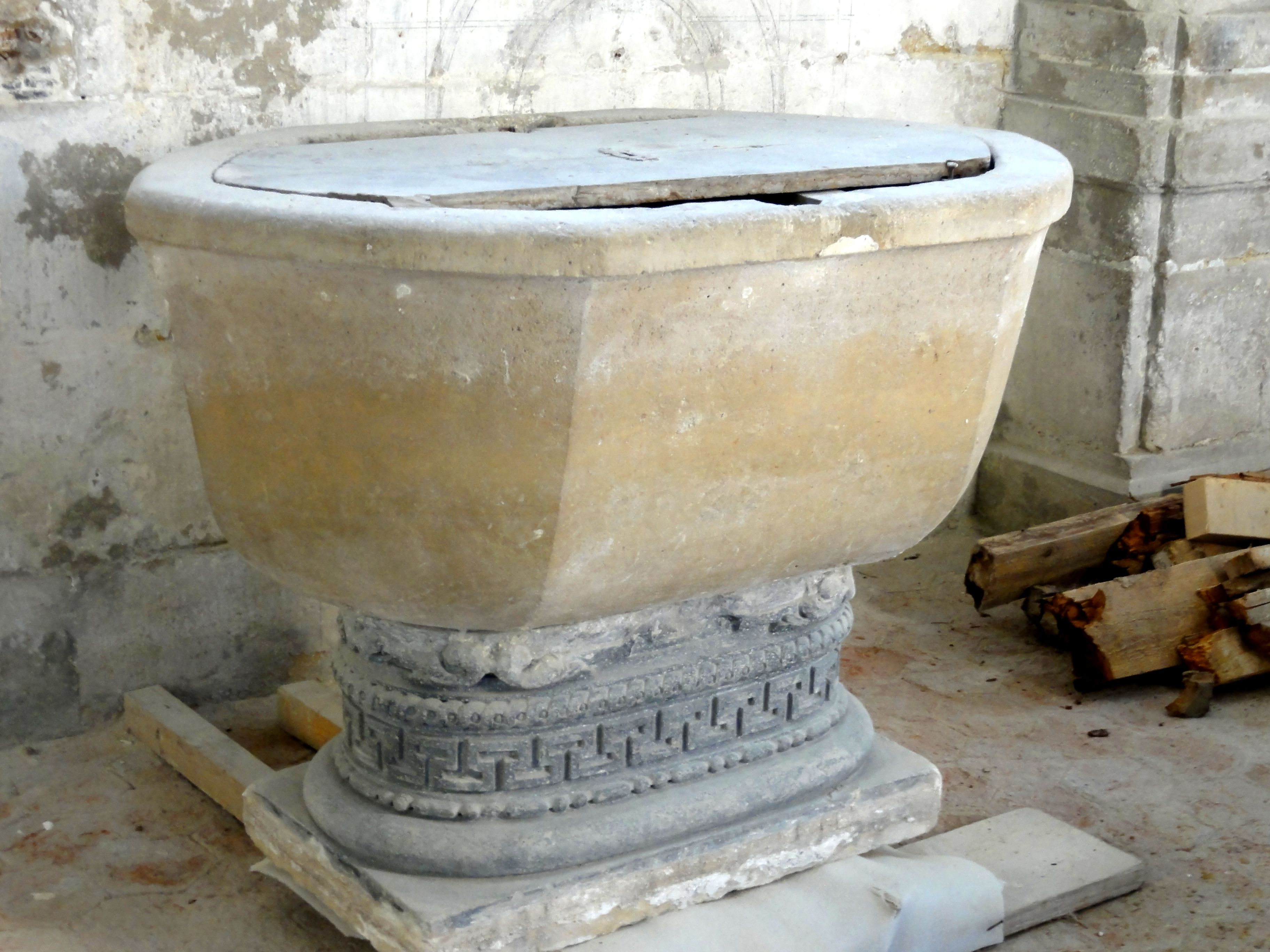 Fonts baptismaux.